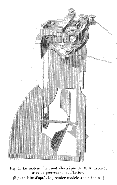 Image du moteur du canot électrique de Gustave Trouvé